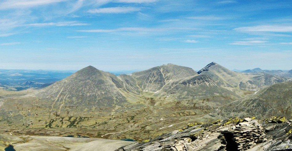 Digerronden, Midtronden and Høgronden seen from Veslesmeden